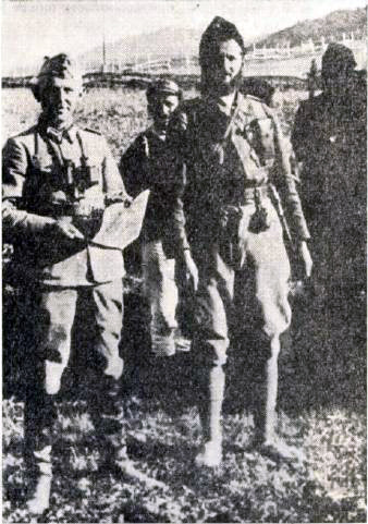 Srpskohrvatski / српскохрватски: Četnik vodi Nemce po terenu (moguće Uroš Drenović).